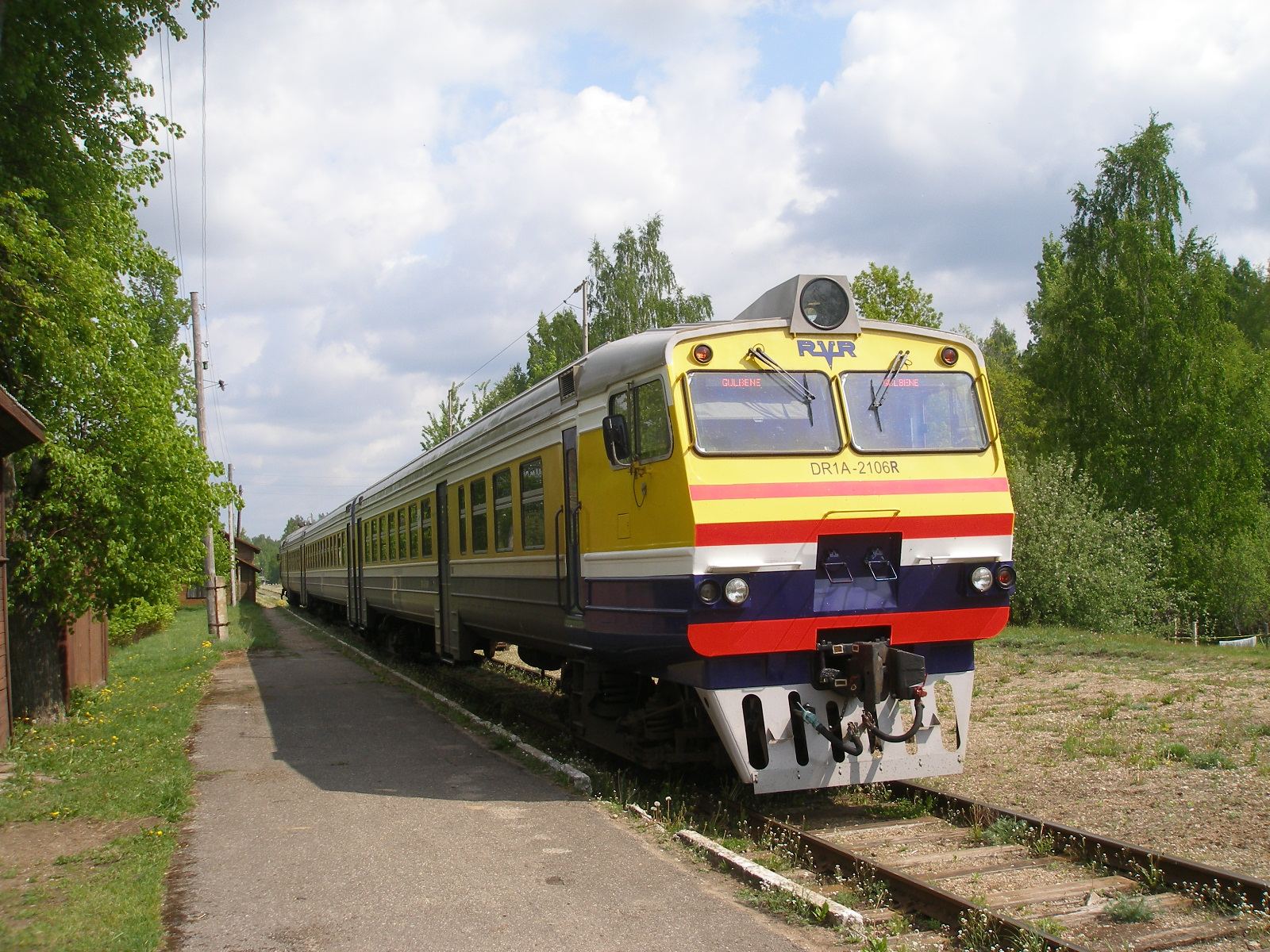 Dīzeļvilciens DR1A-210 atiet no Cesvaines stacijas.